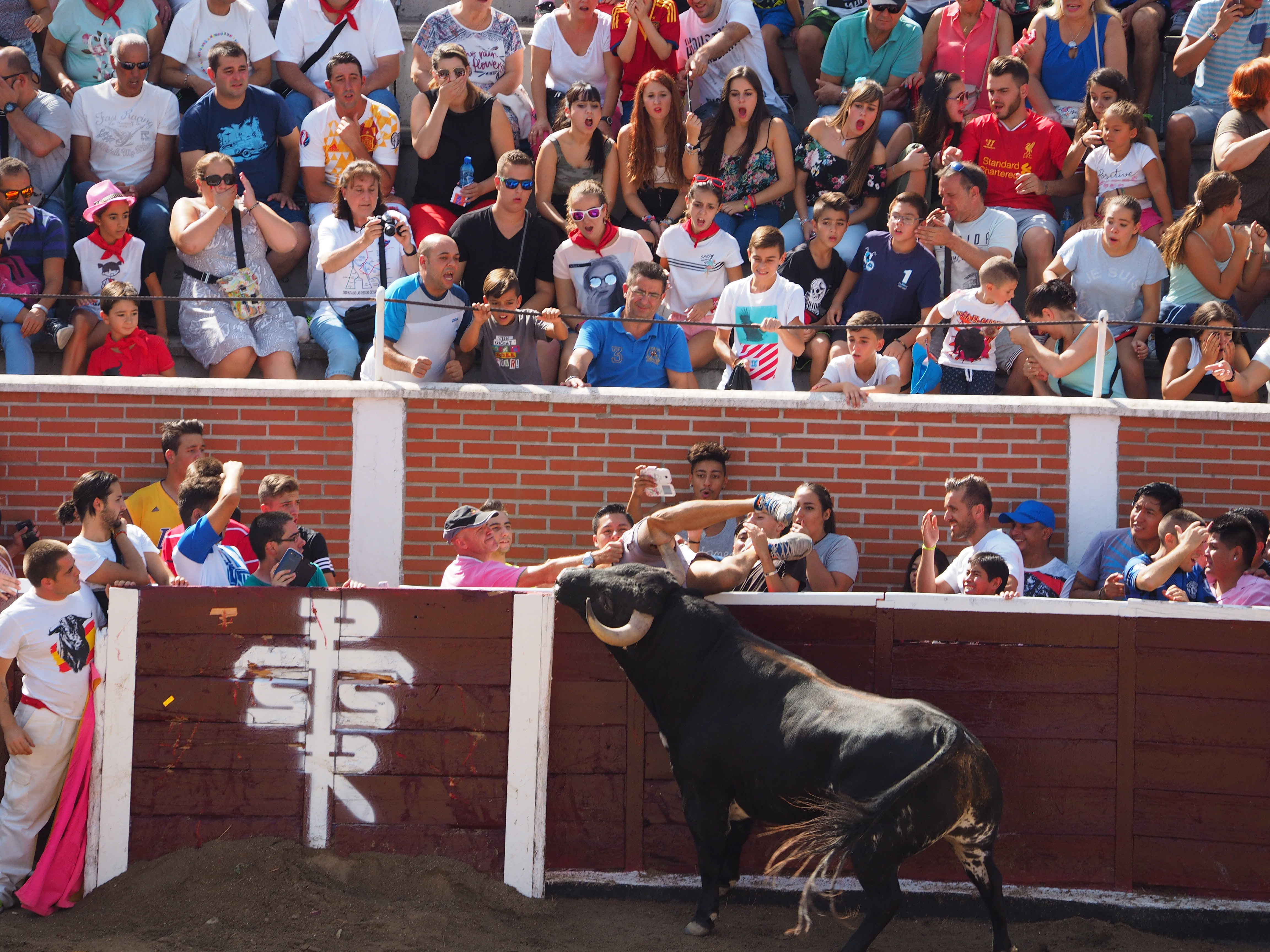 Suelta de reses San Sebastian de los Reyes agosto 2016 This is a photography of a Folklore festival in Spain (Wikidata id Q23452764).